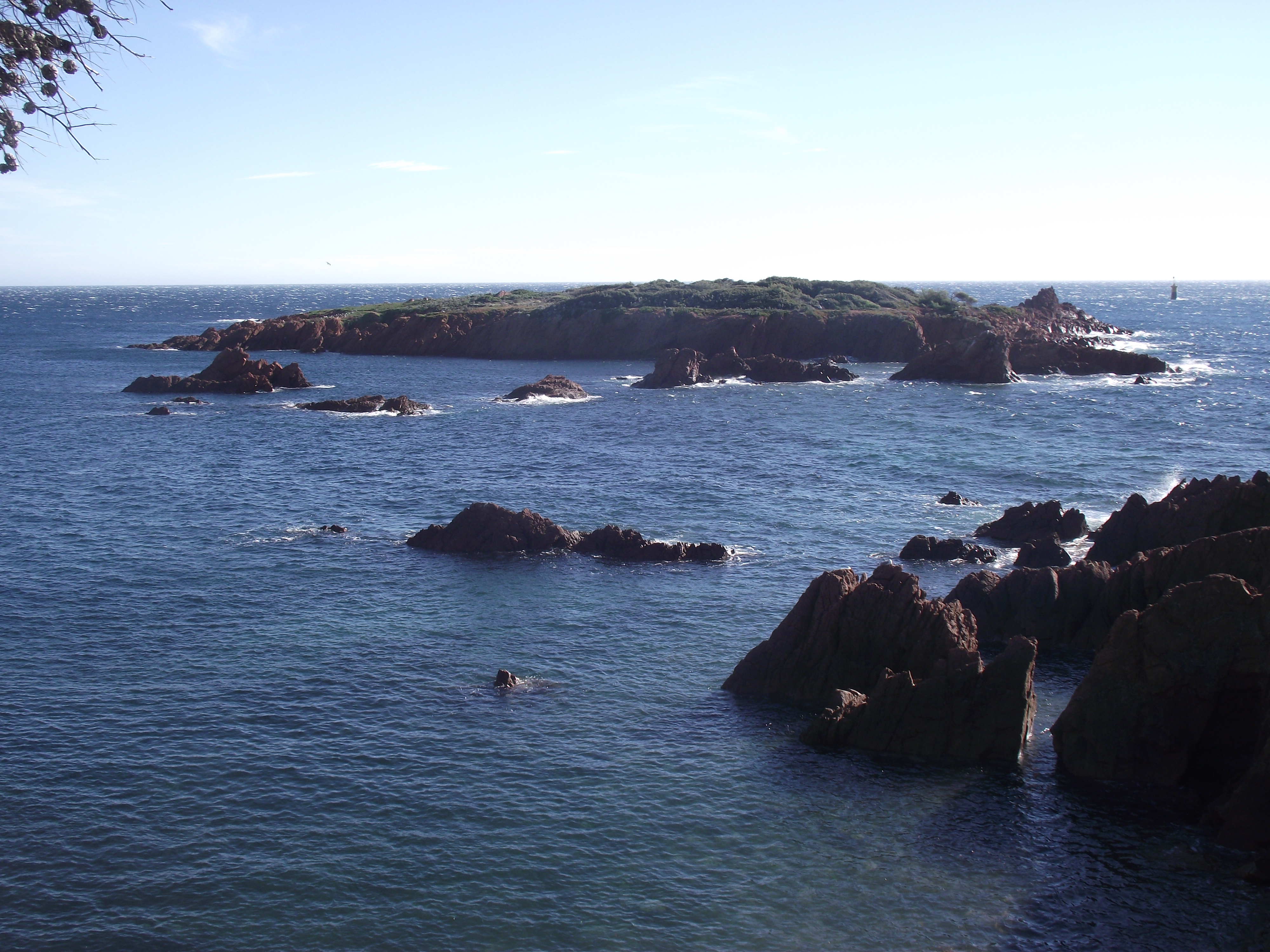 île des vieilles, Saint-Raphaël , Var, France.